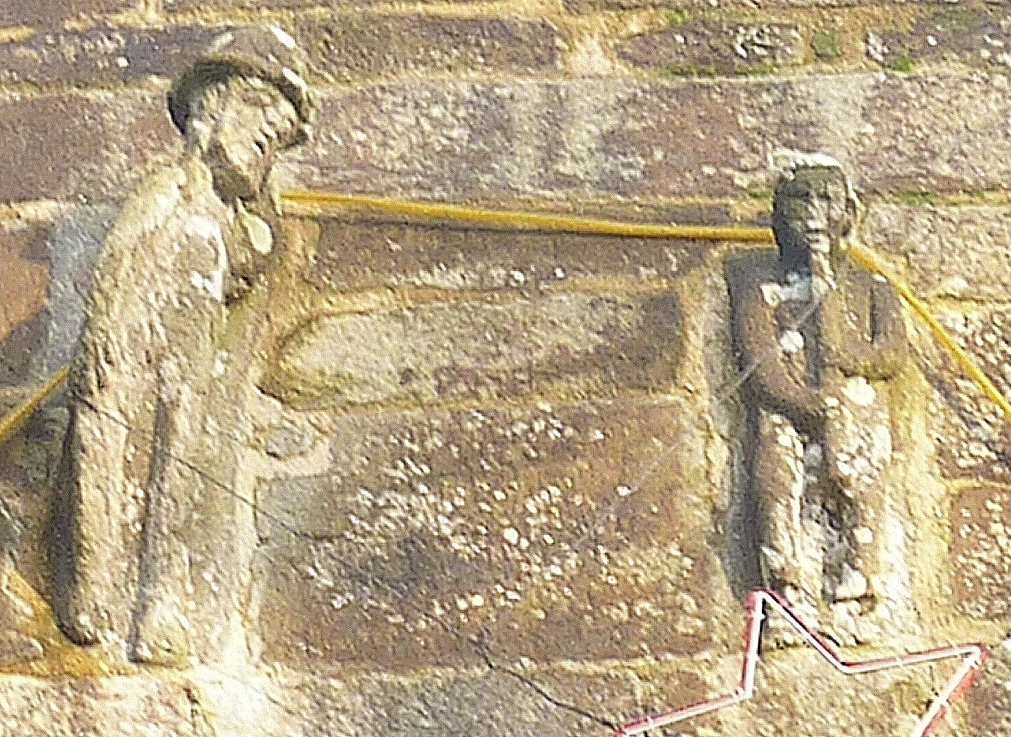 Châteauneuf-du-Faou : chapelle Saint-Ruelin du Moustoir, façade, statue du roi Guinvarc'h (la légende du roi Guinvarc'h raconte que ce dernier, qui aurait vécu au manoir de Pratanroux en Penhars, avait une crinière et des oreilles de cheval. La présence de cette statue du roi Guinvarc'h sur la façade de cette chapelle s'explique par le mariage de Jacques de Rosily avec Jeanne Le Baud, héritière de la seigneurie de Pratanroux, en 1594. Ce sont eux qui firent construire le clocher-pignon de la chapelle en 1627